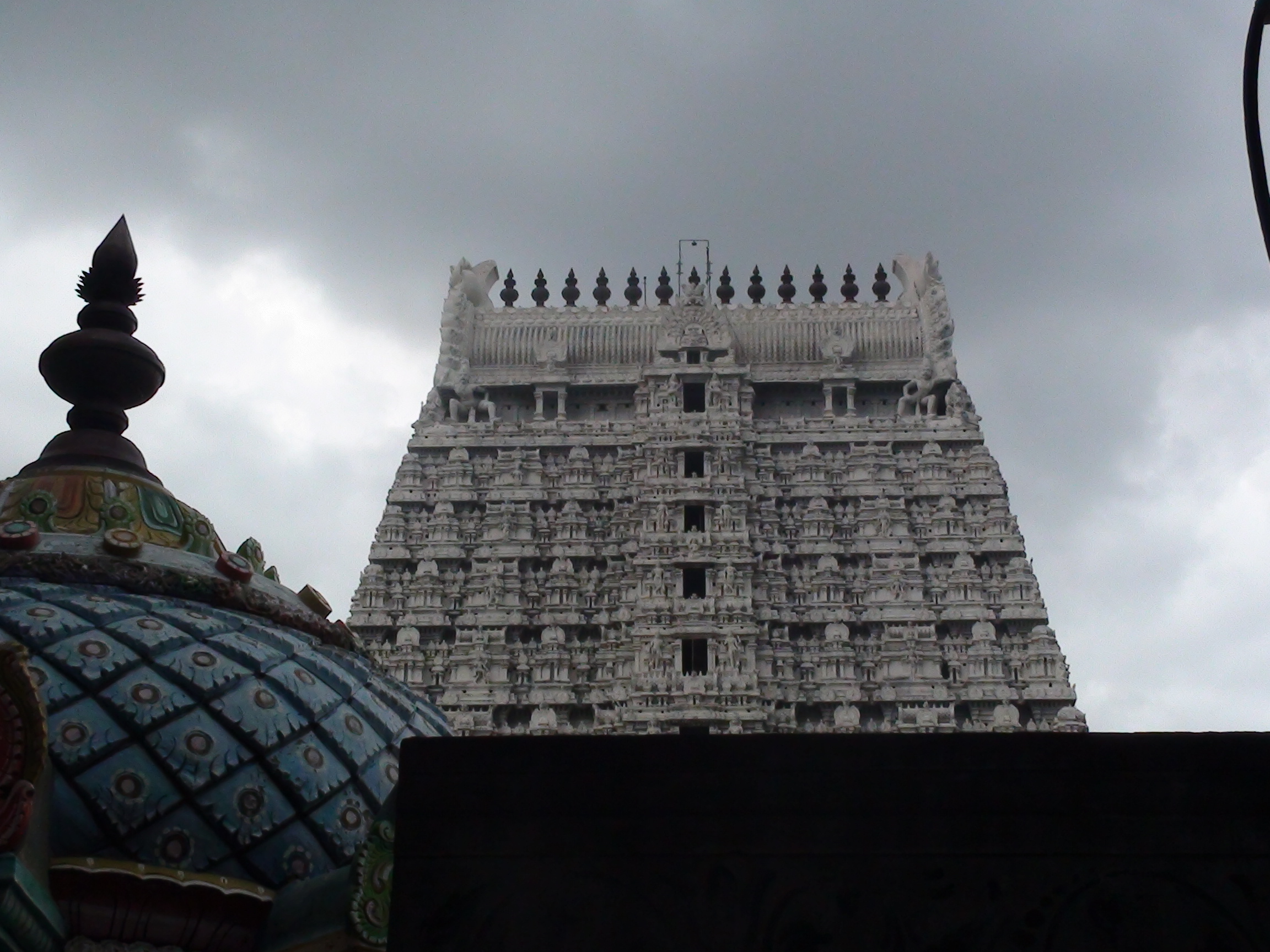 திருவண்ணாமலையில் அருள்பாலிக்கும் அண்ணாமலையார் திருக்கோயில் கோபுரக் காட்சி